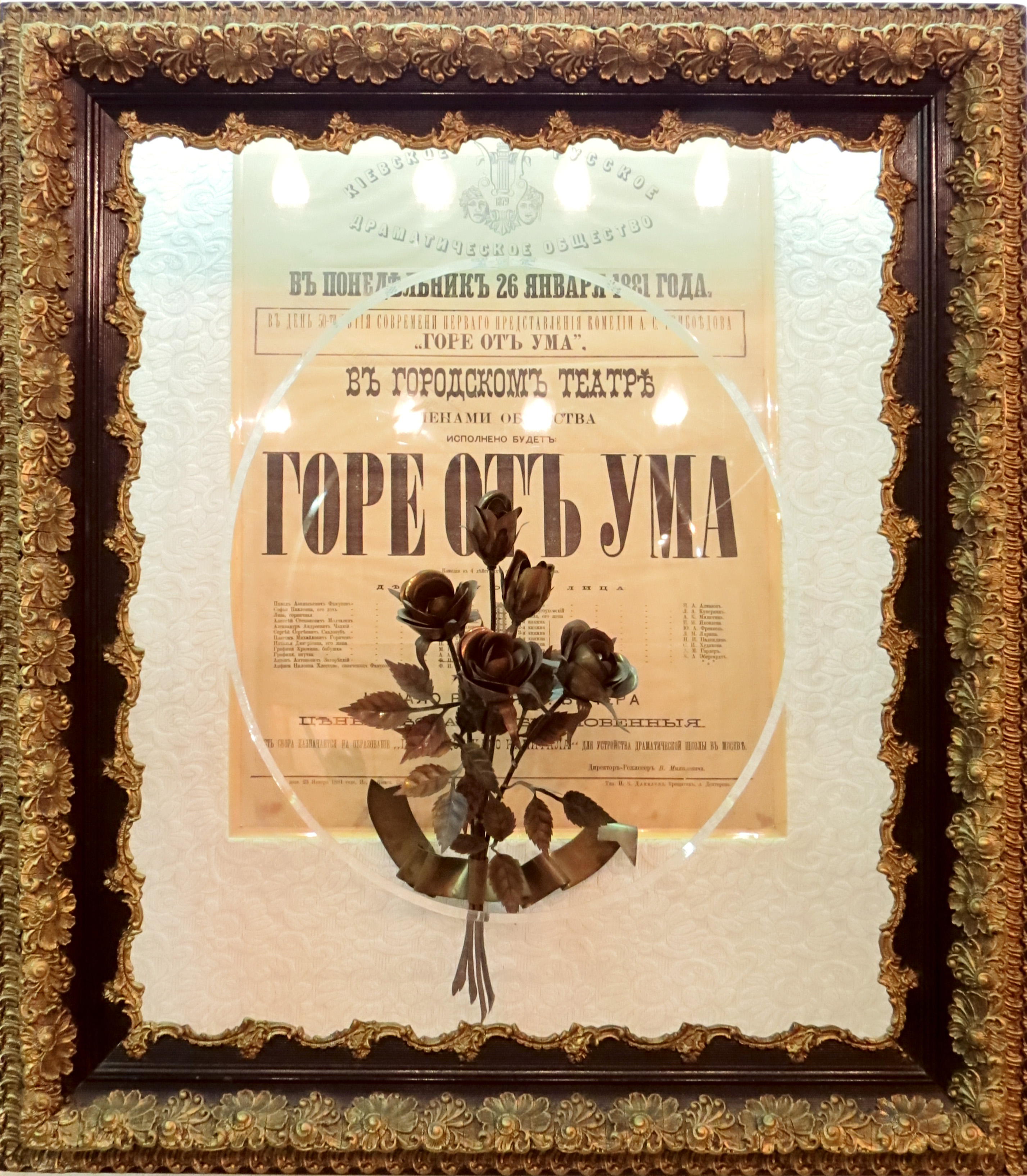 Експозиція Київського музея театрального, музичного та кіномистецтва України. Афіша вистави «Лихо з розуму», Київ, 1881